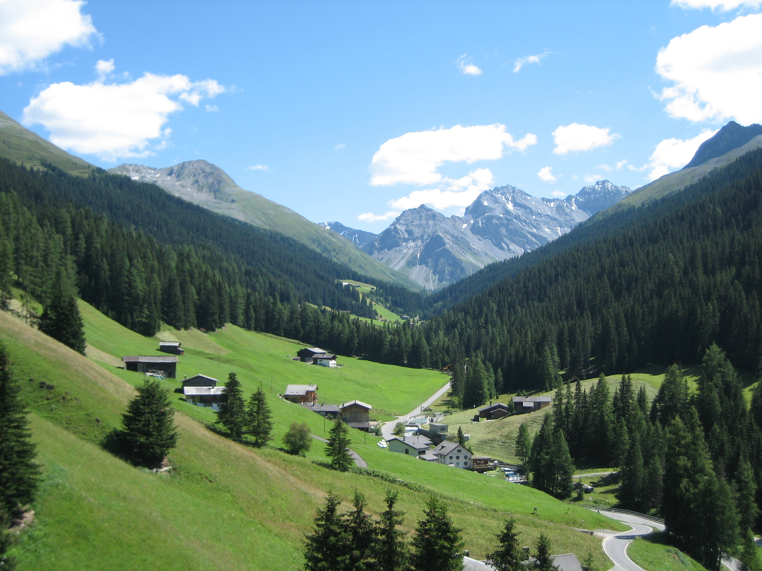 Im Sertig